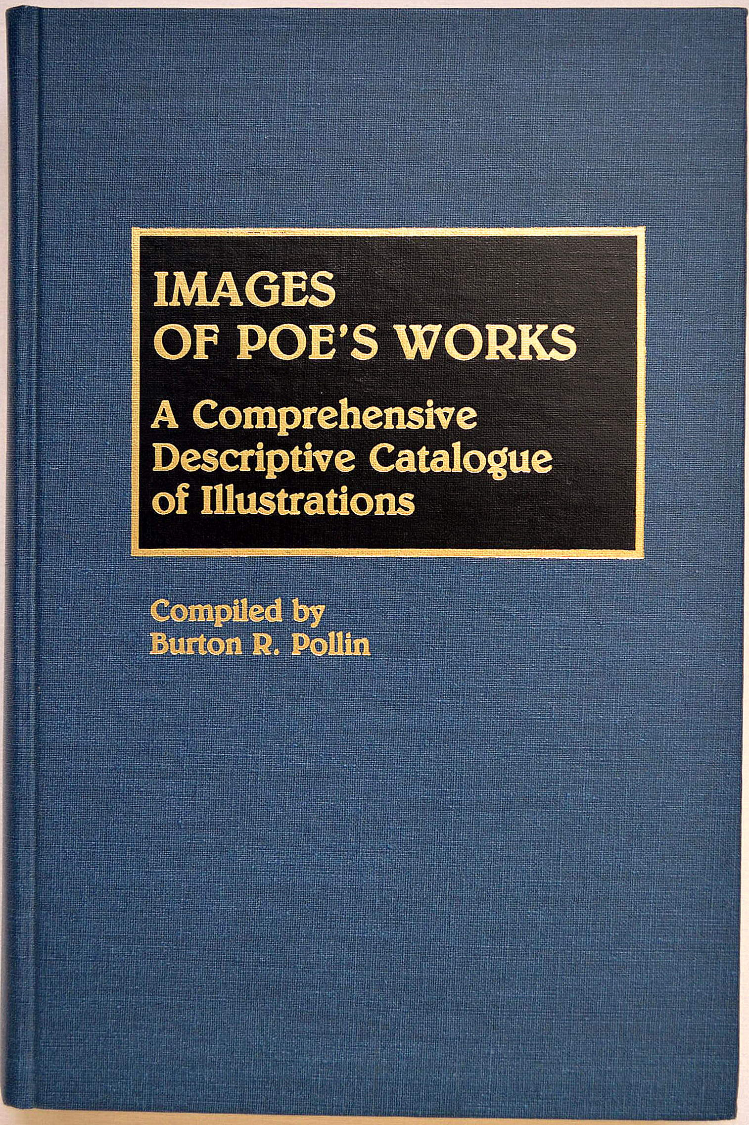 Burton Ralph Pollin: Einbanddeckel von Images of Poe’s Works: A Comprehensive Descriptive Catalogue of Illustrations. Greenwood Press 1989, ISBN 978-0-313265-82-2